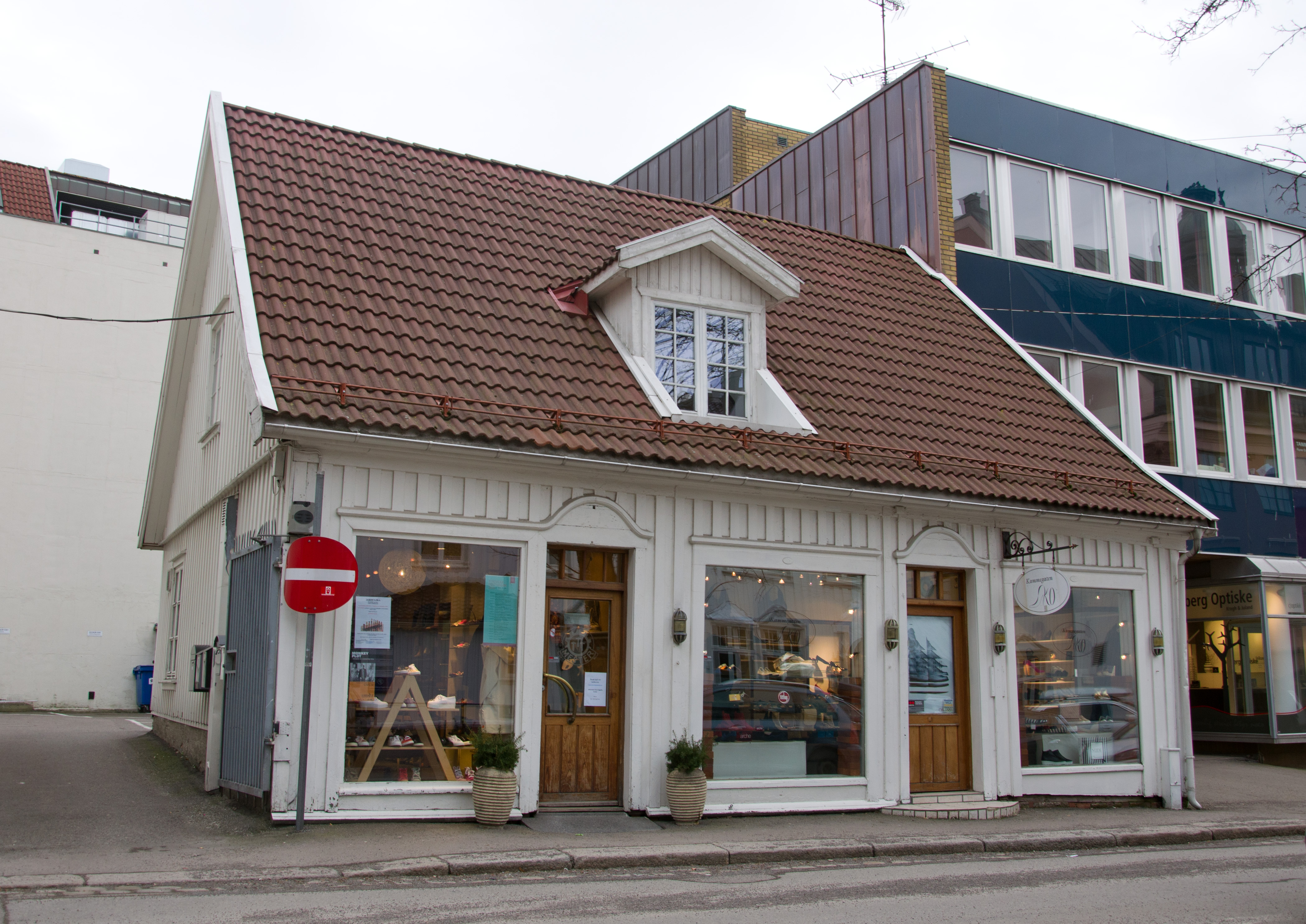 Kammegaten 7, Tønsberg